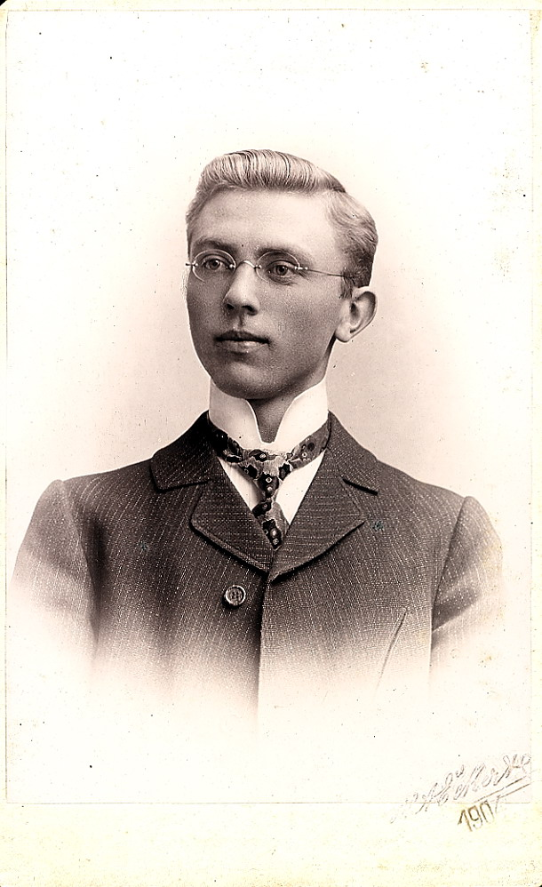 Jan Cyž-Hajničanski (1883–1948) w młodych lětach.